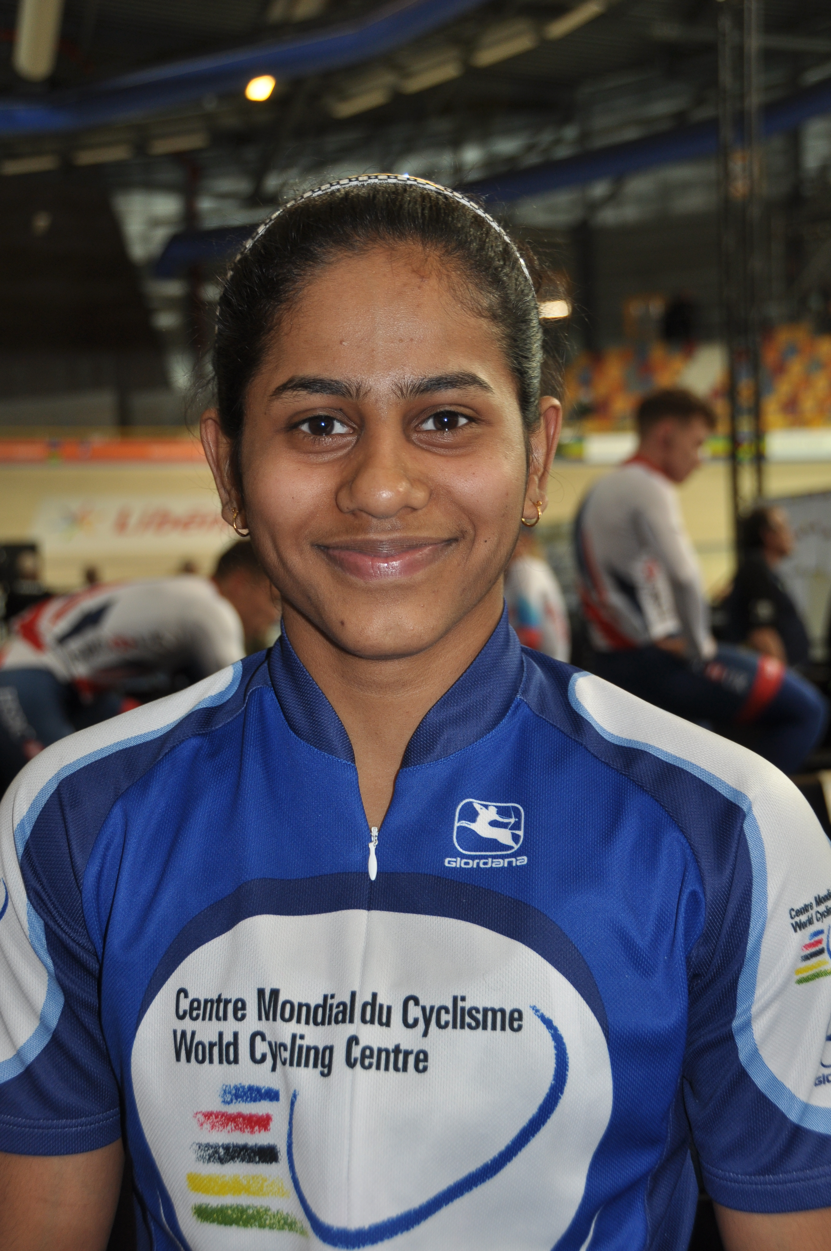 Alena Reji, indische Radsportlerin